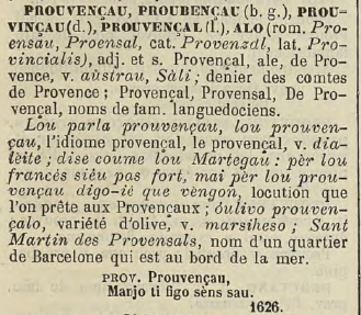 Entrée "prouvençau" du Trésor du Félibrige.